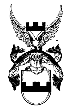 Wrangell Armorial